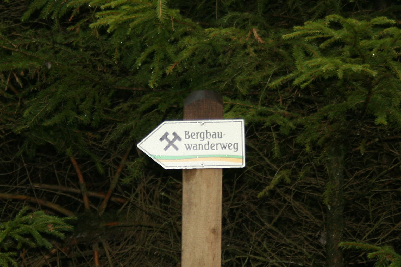 Hinweisschild Bergbauwanderweg in Bestwig